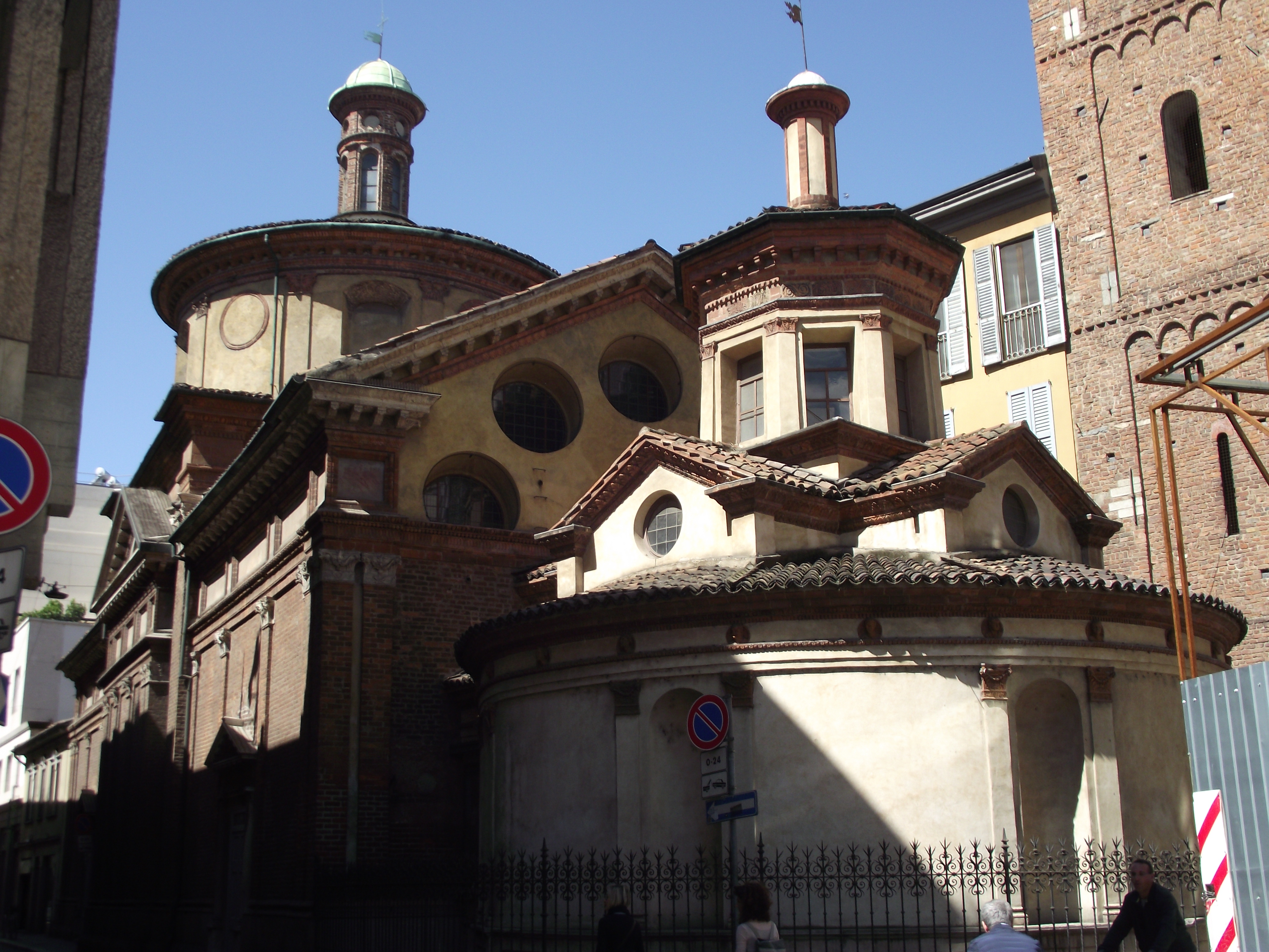 Veduta posteriore.